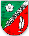 Wapen von de Gemeen Homersen, Landkreis Rodenborg, Neddersassen